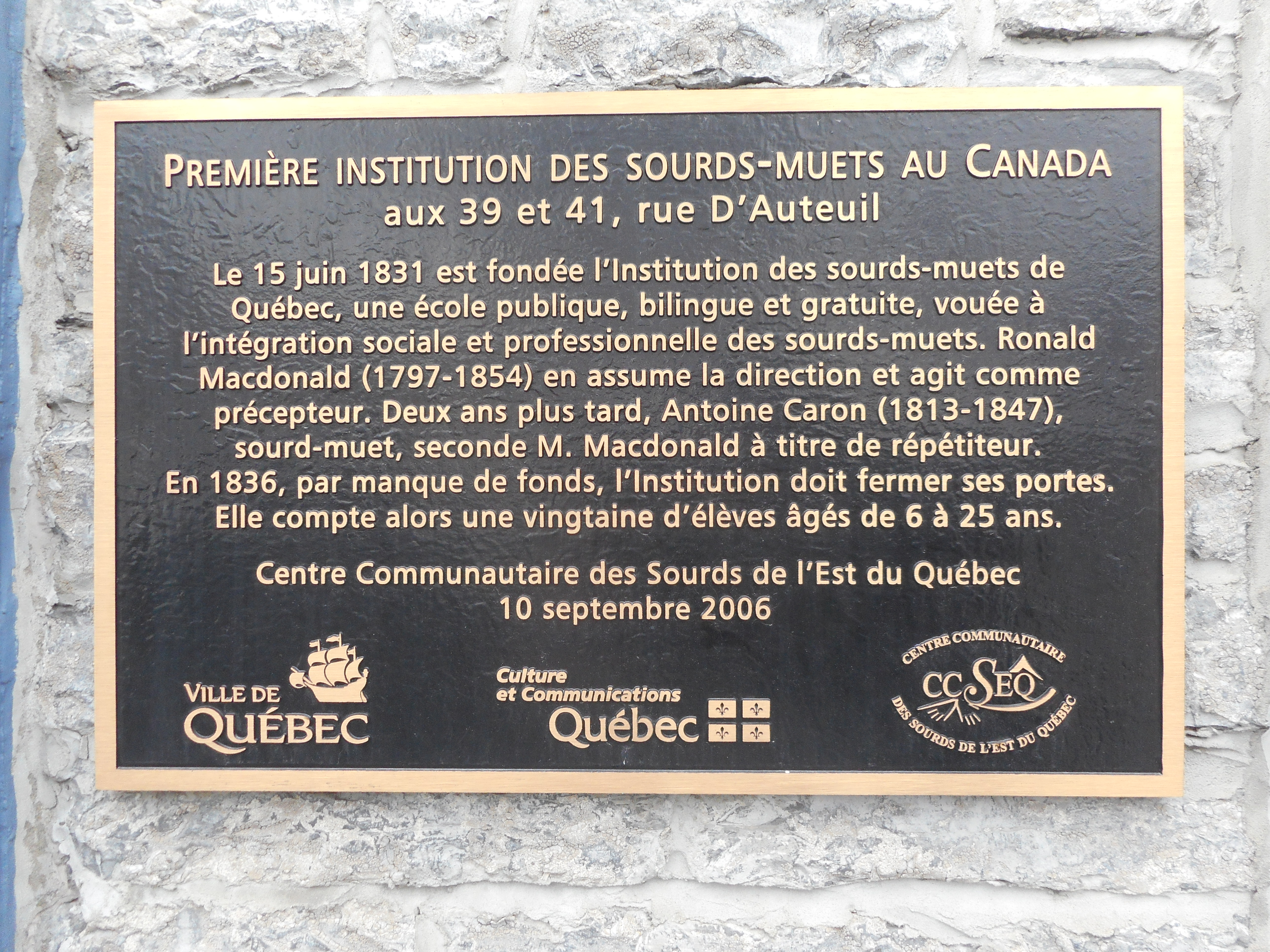 Plaque apposée à la maison Pierre-Dassylva, au 41, rue D'Auteuil, Québec Texte de la plaque « Première institution des sourds-muets au Canada aux 39 et 41, rue D'Auteuil Le 15 juin 1831 est fondé l'Institution des sourds-muets de Québec, une école publique, bilingue et gratuite, vouée à l'intégration sociale et professionnelle des sourds-muets. Ronald Macdonald (1797-1854) en assume la direction et agit comme précepteur. Deux ans plus tard, Antoine Caron (1813-1847), sourd-muet, seconde M. Macdonald à titre de répétiteur. En 1836, par manque de fonds, l'Institution doit fermer ses portes. Elle compte alors une vingtaine d'élèves âgés de 6 à 25 ans. Centre Communautaire des Sourds de l'Est du Québec 10 septembre 2006 »